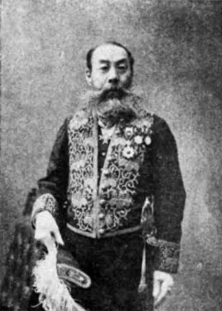 金井之恭（1833-1907）